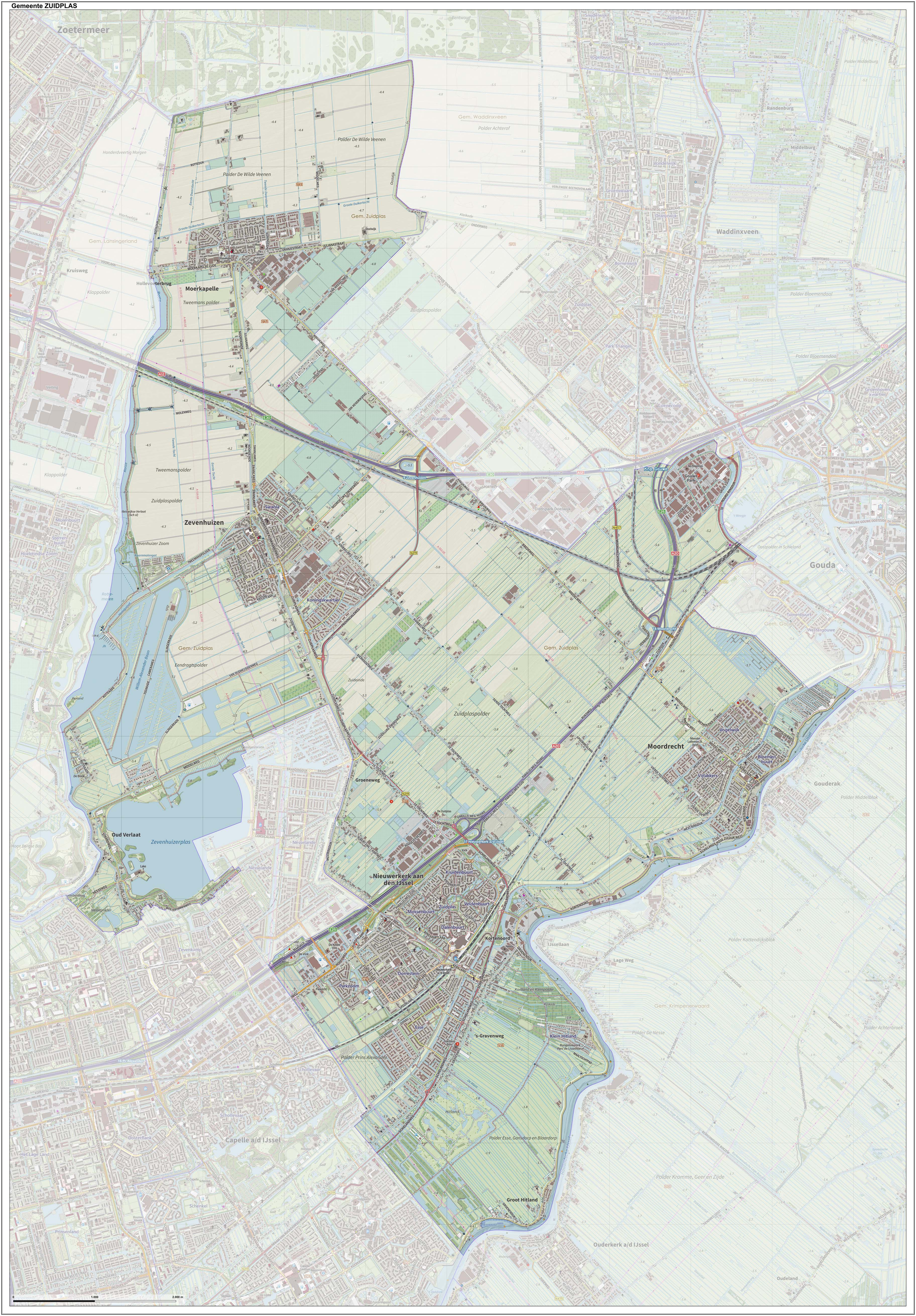 Topografische gemeentekaart. Resolutie: 400 pixels/km. Kaartbeeld samengesteld uit de open geodata van de Top10NL en Top25namen (Kadaster), Creative Commons-BY licentie. Gebouwvlakken uit open geodata BAG extract. Wegen uit de OpenStreetMap, OpenStreetMap community. Reliëfschaduw uit de Actuele Hoogtekaart AHN2. Samenstelling en kleurenschema: Jan-Willem van Aalst, met QGIS. Zie ook de Legenda.